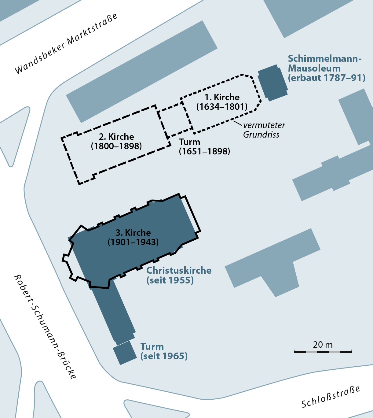 Lage der Kirchen am Wandsbeker Marktplatz 1634 bis heute